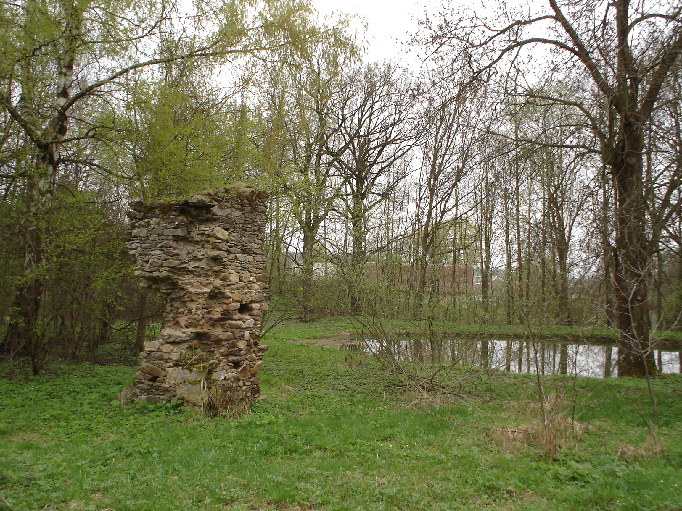 Tvrz, Speřice 13, Speřice.